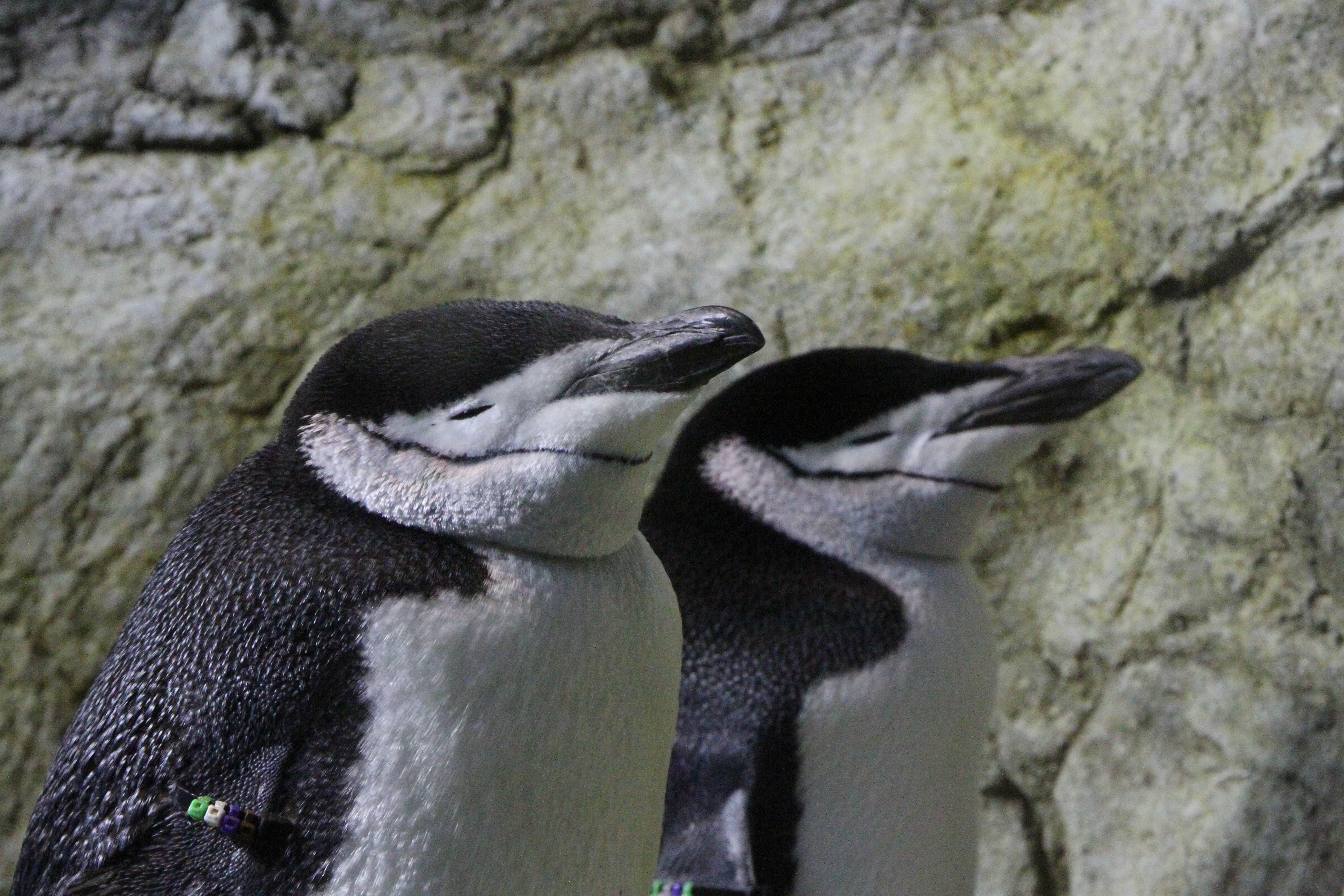 At Wakayama Adventure World in Japan